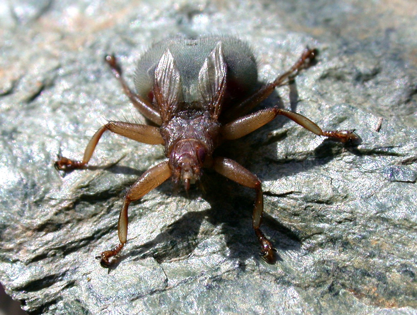 Mauerseglerlausfliege (Crataerina vollgesogen mit Mauerseglerblut